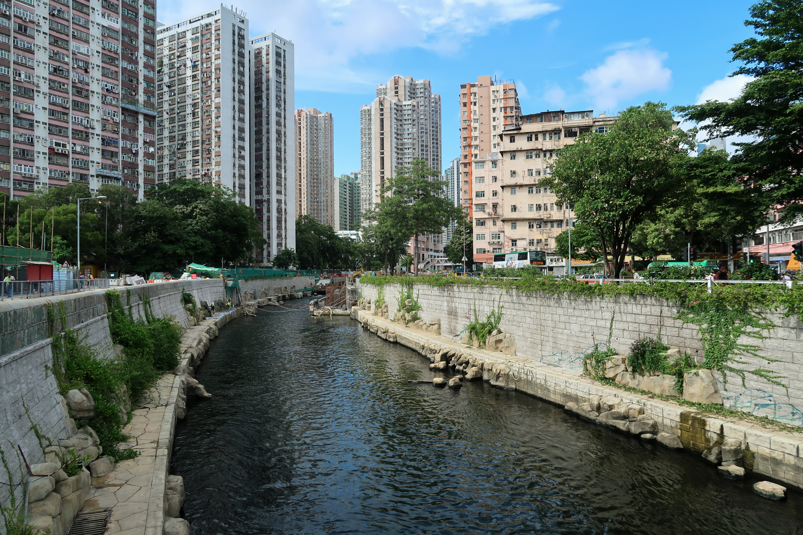 Kai Tak River